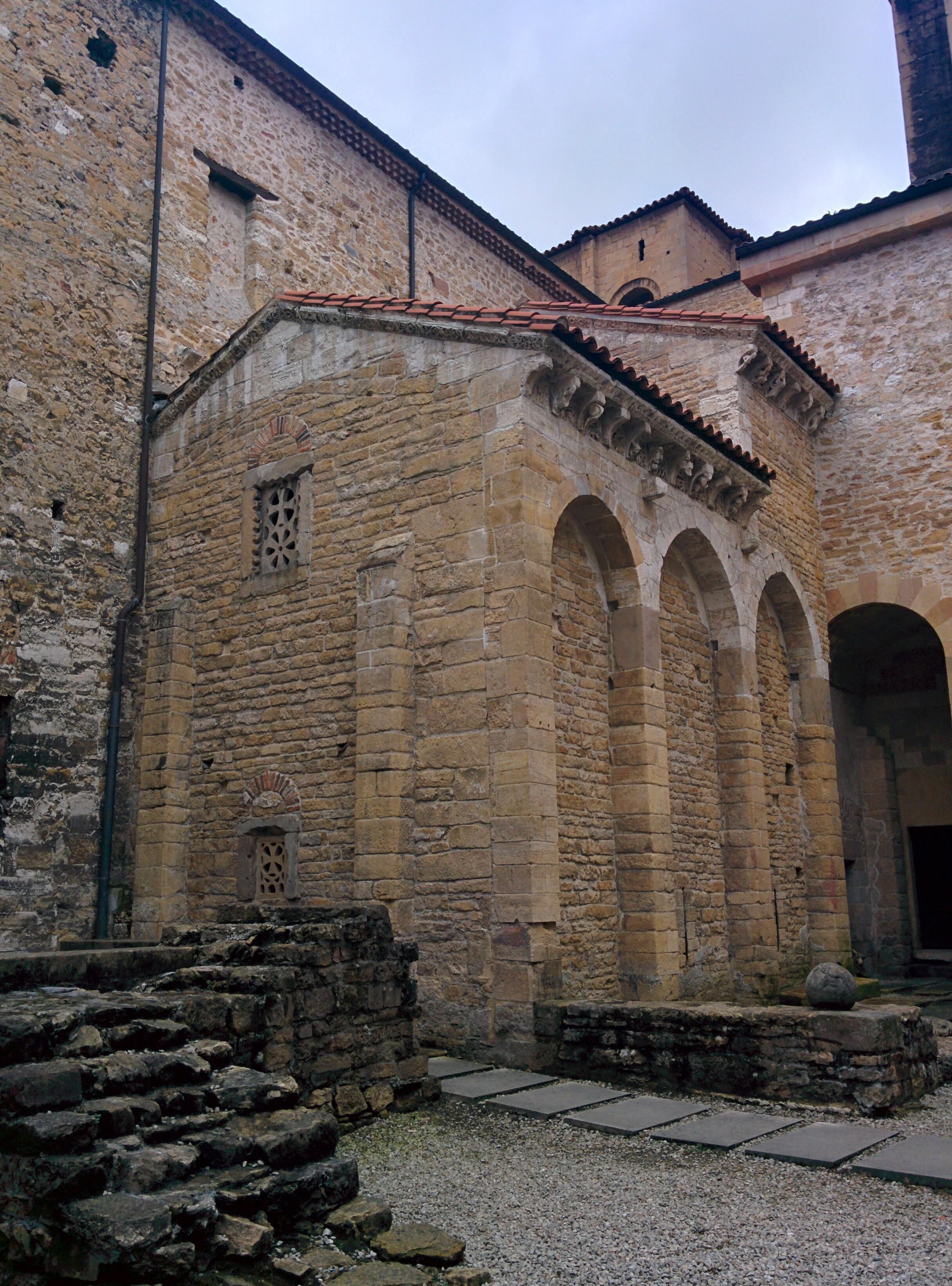 Exterior de la Cámara Santa, en la catedral de Oviedo (España).